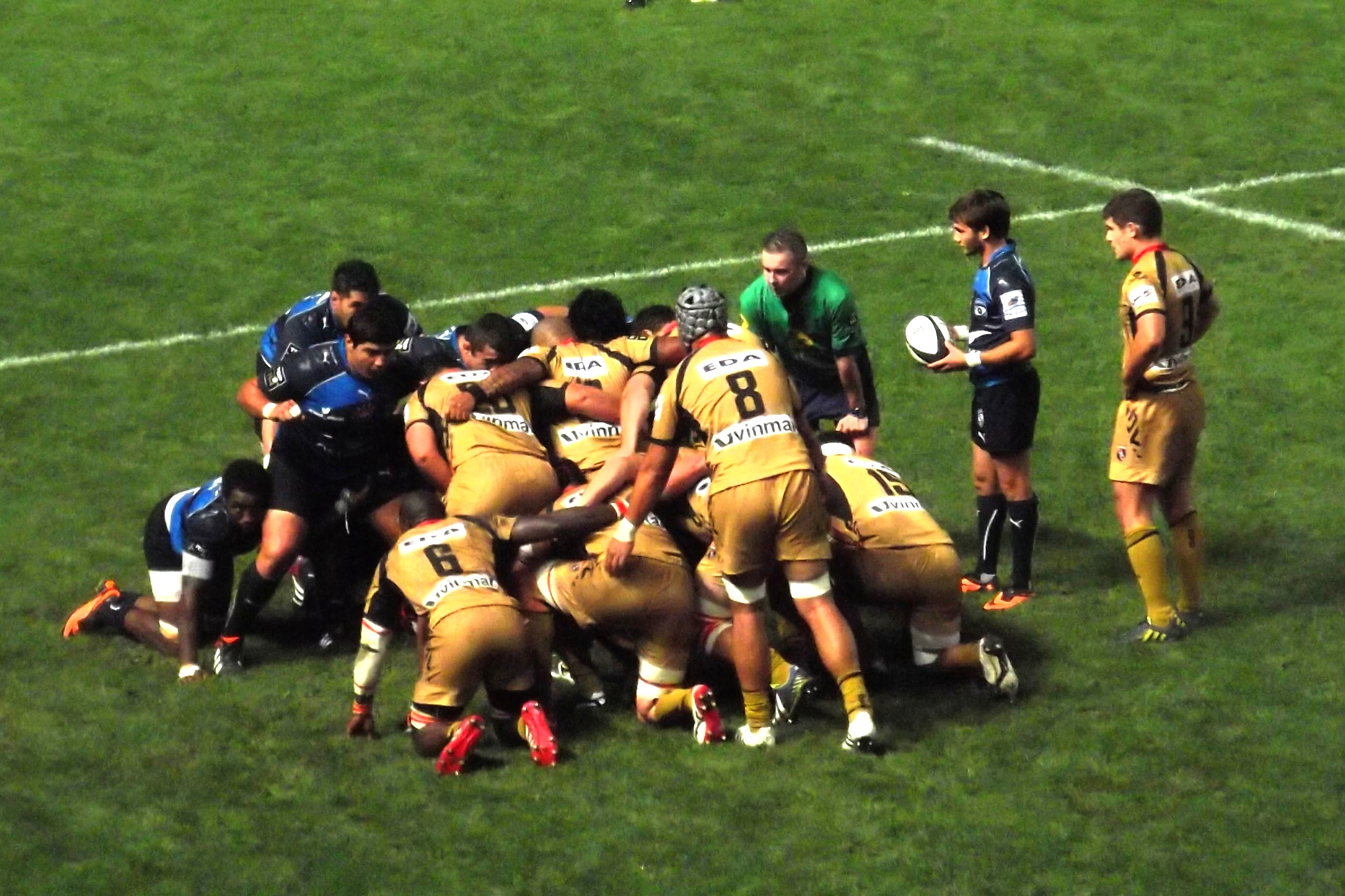 MHR-Oyonnax, 5 octobre 2013.